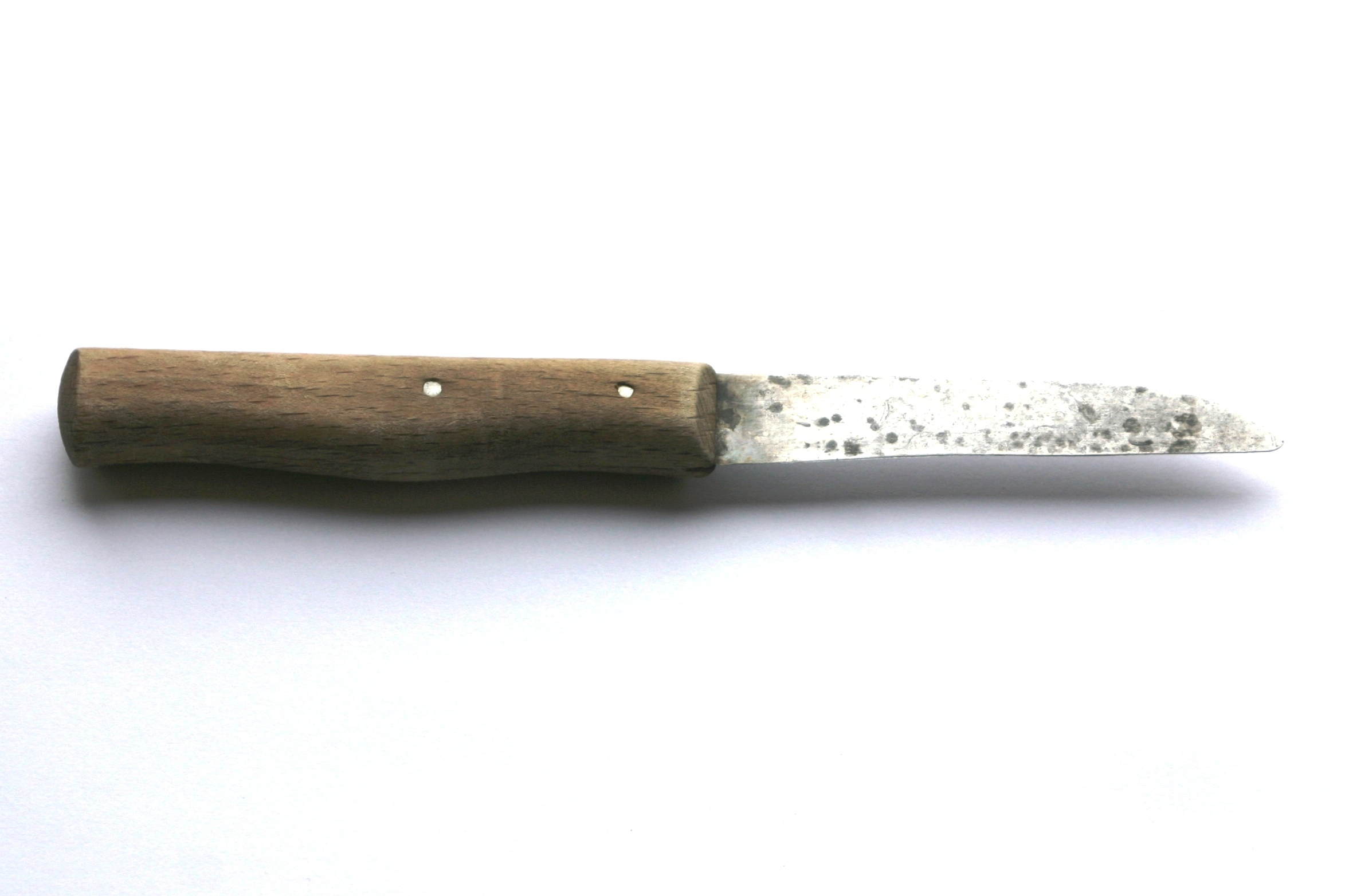 Bild vun ëngem benotzten Knäip Auteur: Les Meloures